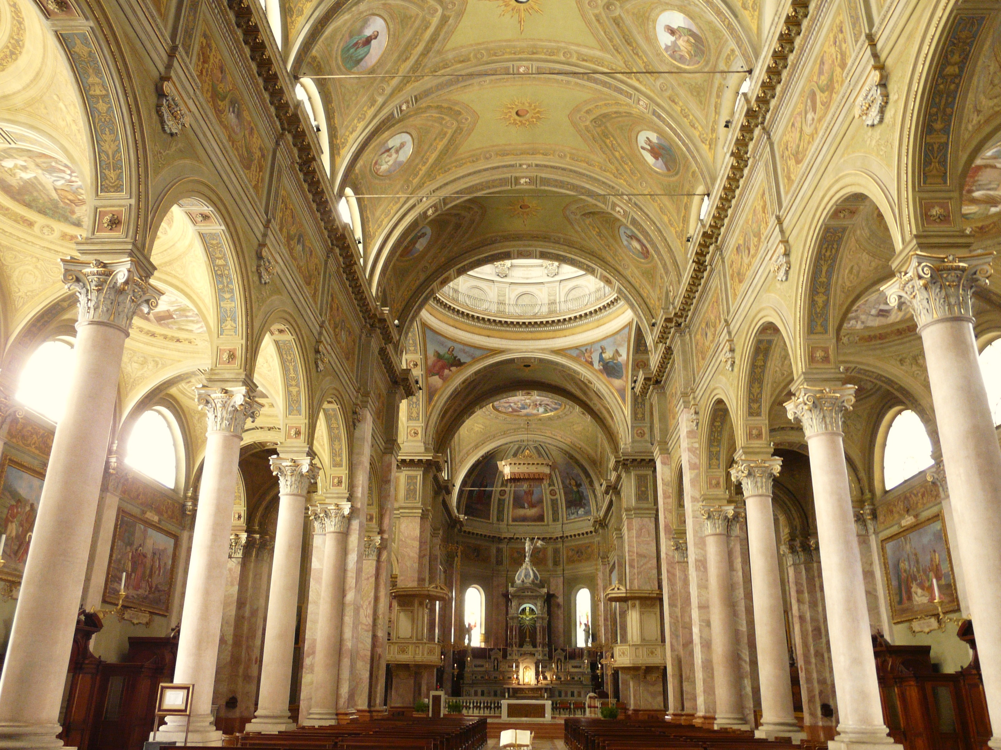 Navata centrale della Chiesa di San Martino, Magenta, Lombardia, Italia